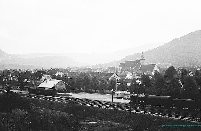 Wassergärten und Bahnhof, Weilheim an der Teck